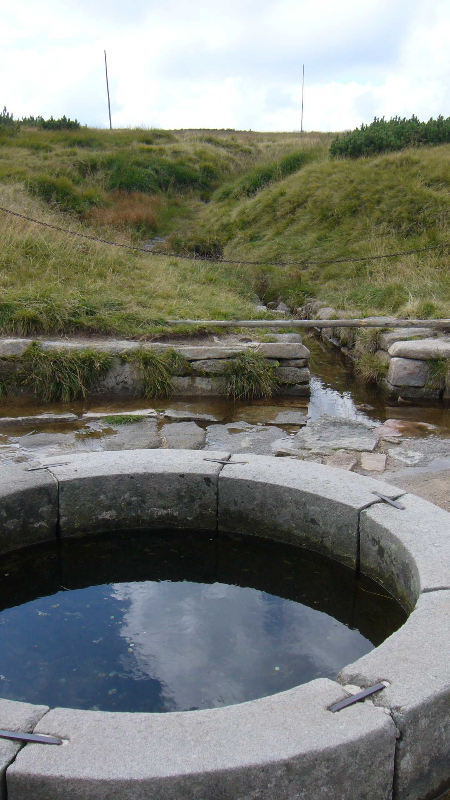 Źródło Łaby na stokach Łabskiego Szczytu w Karkonoszach, Czechy